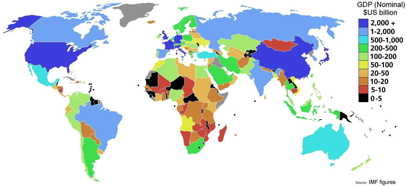 Mappa Prodotto Interno Lordo 2003